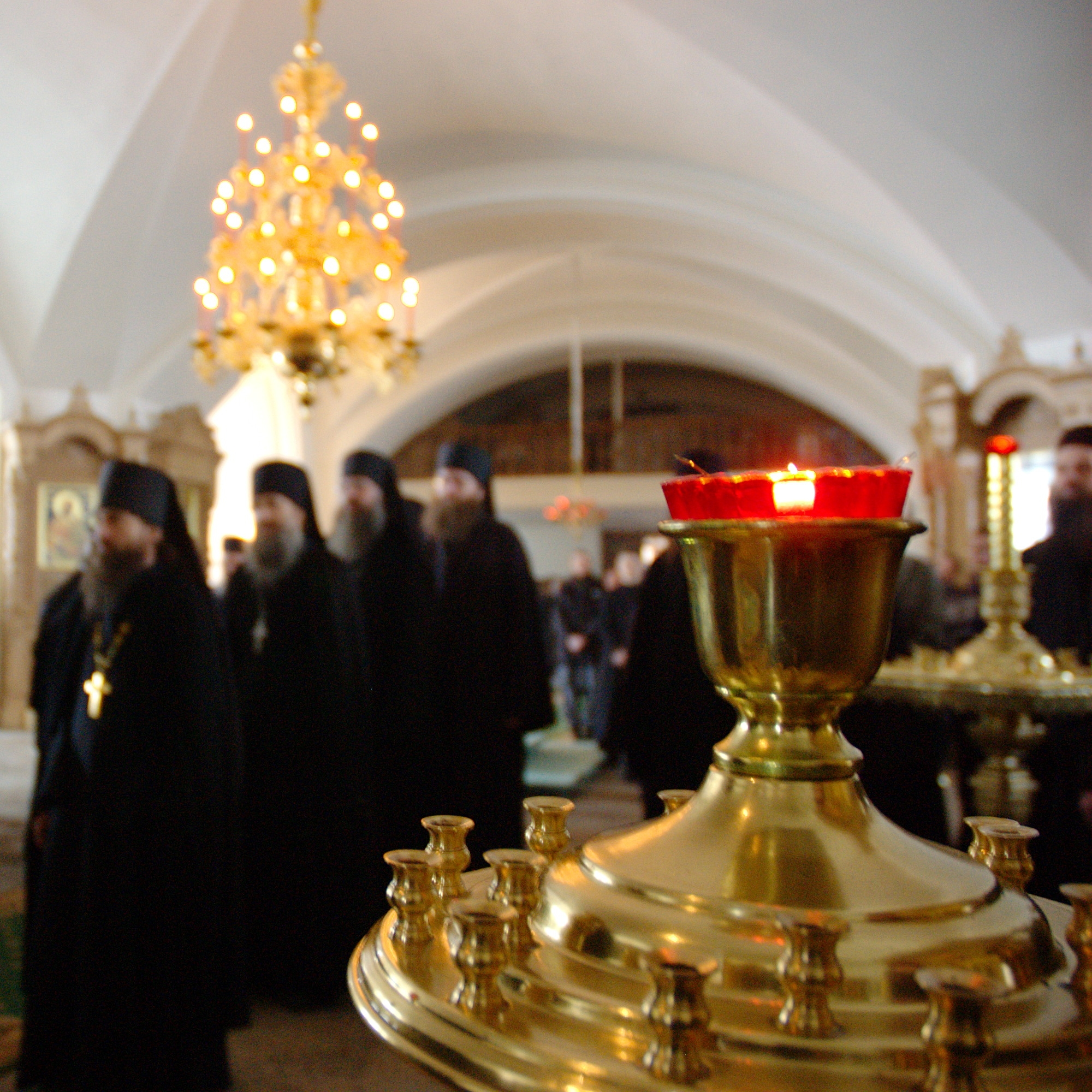 The light of the world В церкви преподобных Сергия и Германа Валаамских Спасо-Преображенского собора Валаамского монастыря.